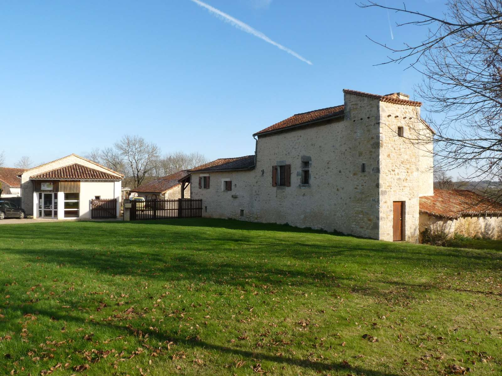 les "Jardins du Bandiat", près de l'église de Souffrignac, Charente, France